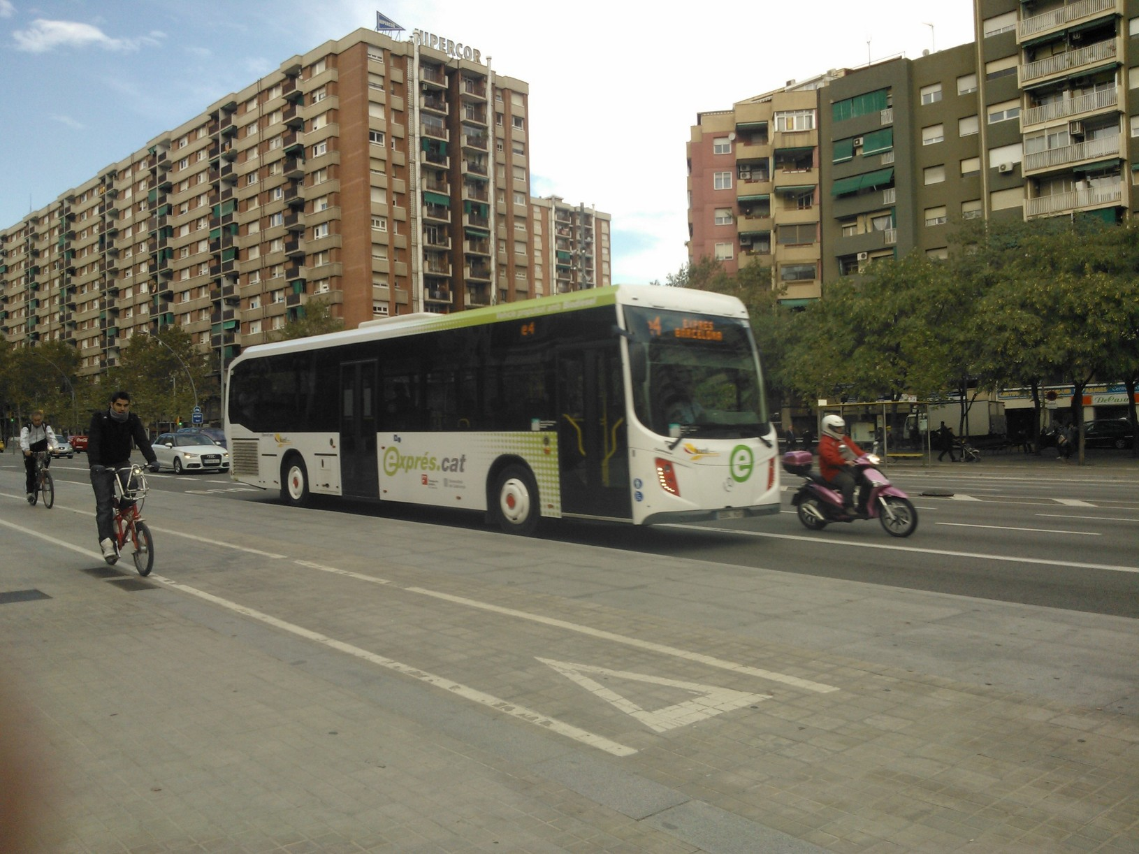 Autobús interurbà/urba a Barcelona